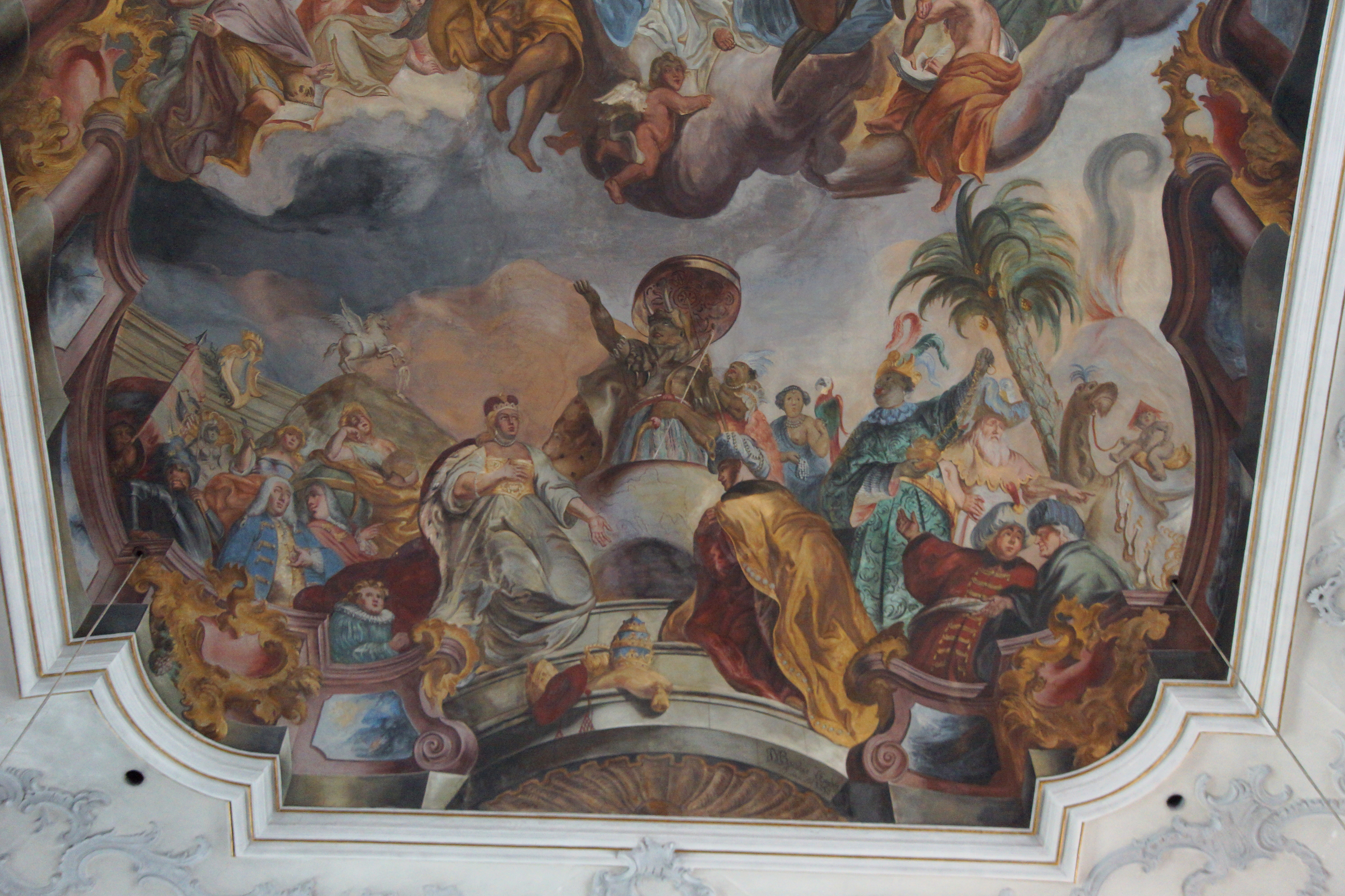 Die katholische Pfarrkirche Mariä Himmelfahrt in Berching in der Oberpfalz